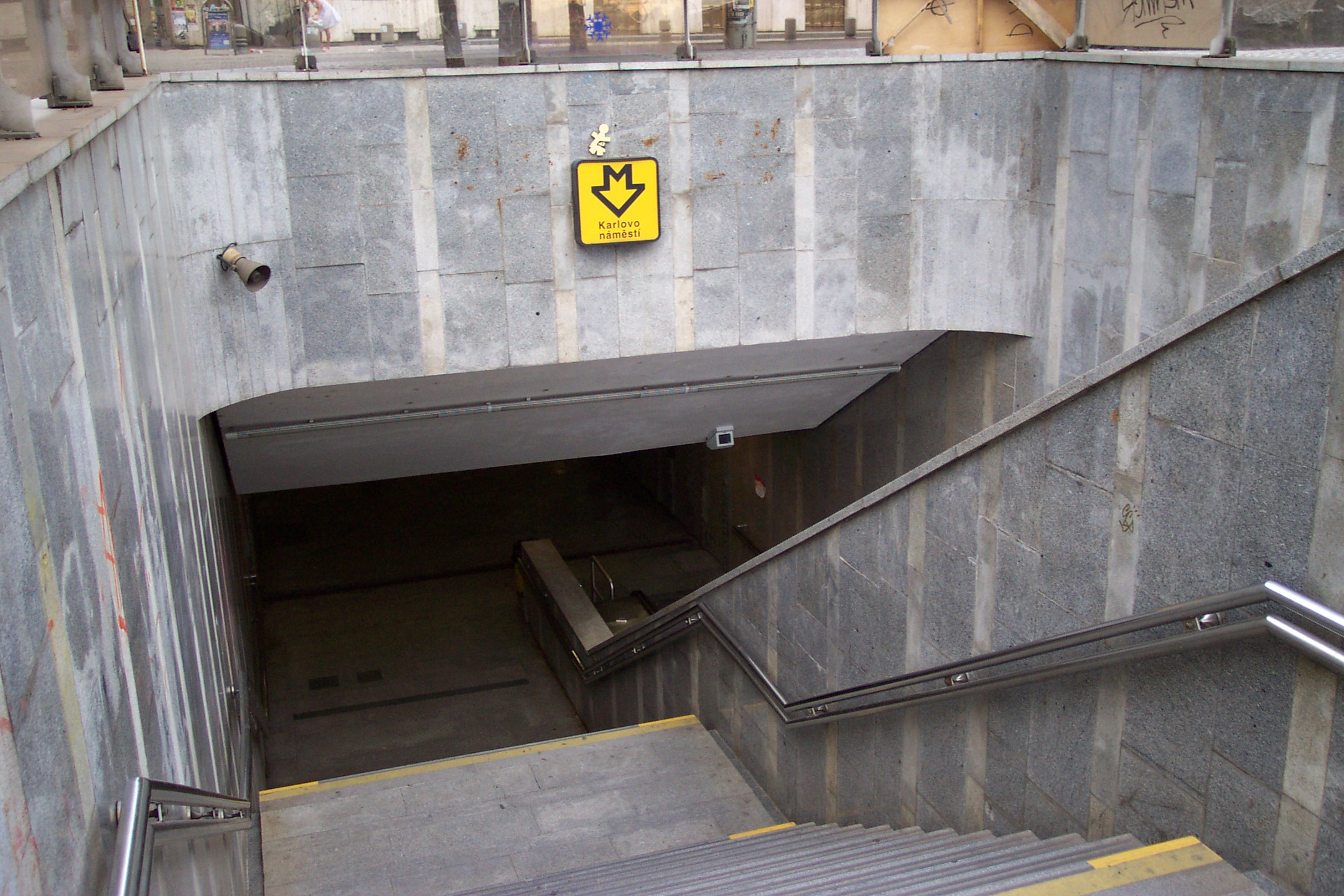 Stanice metra Karlovo náměstí - Metro station Karlovo náměstí